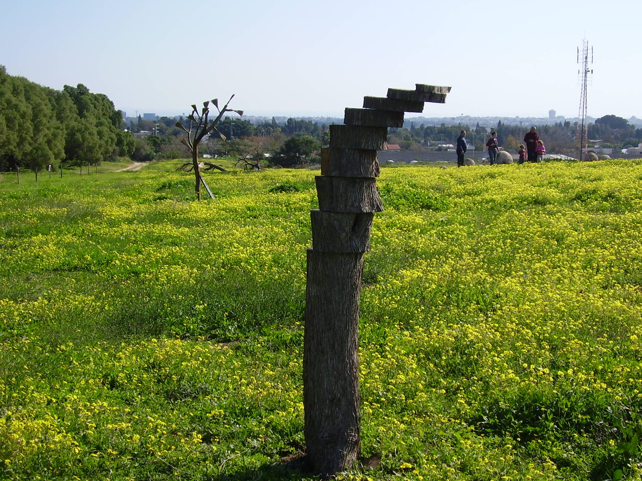 ארסוף קדם - "העץ הנדיב" - הגלרייה הפתוחה נוצר על ידי he:משתמש:Avi1111